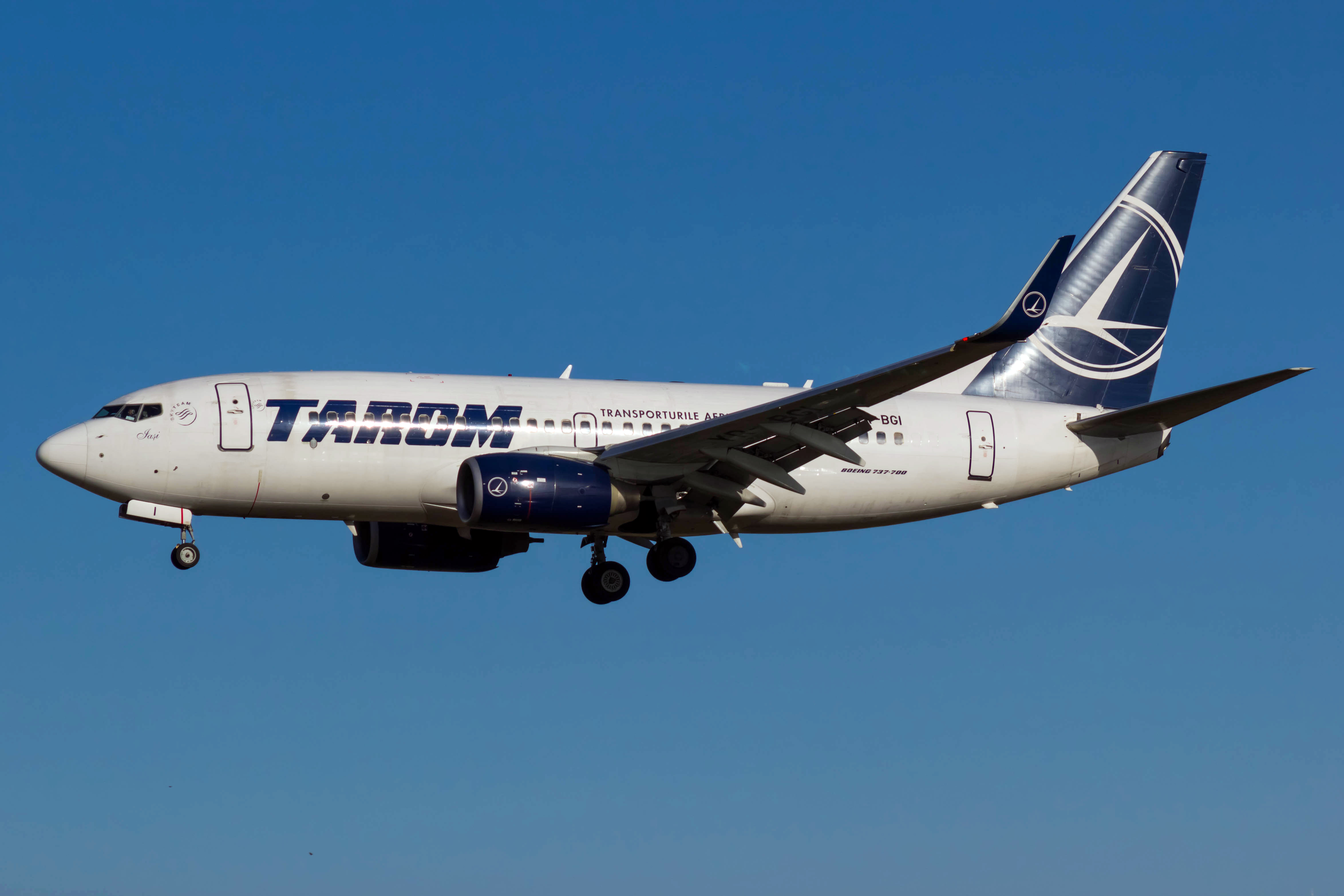 Boeing 737 de Tarom aterrando no aeroporto de Barcelona.